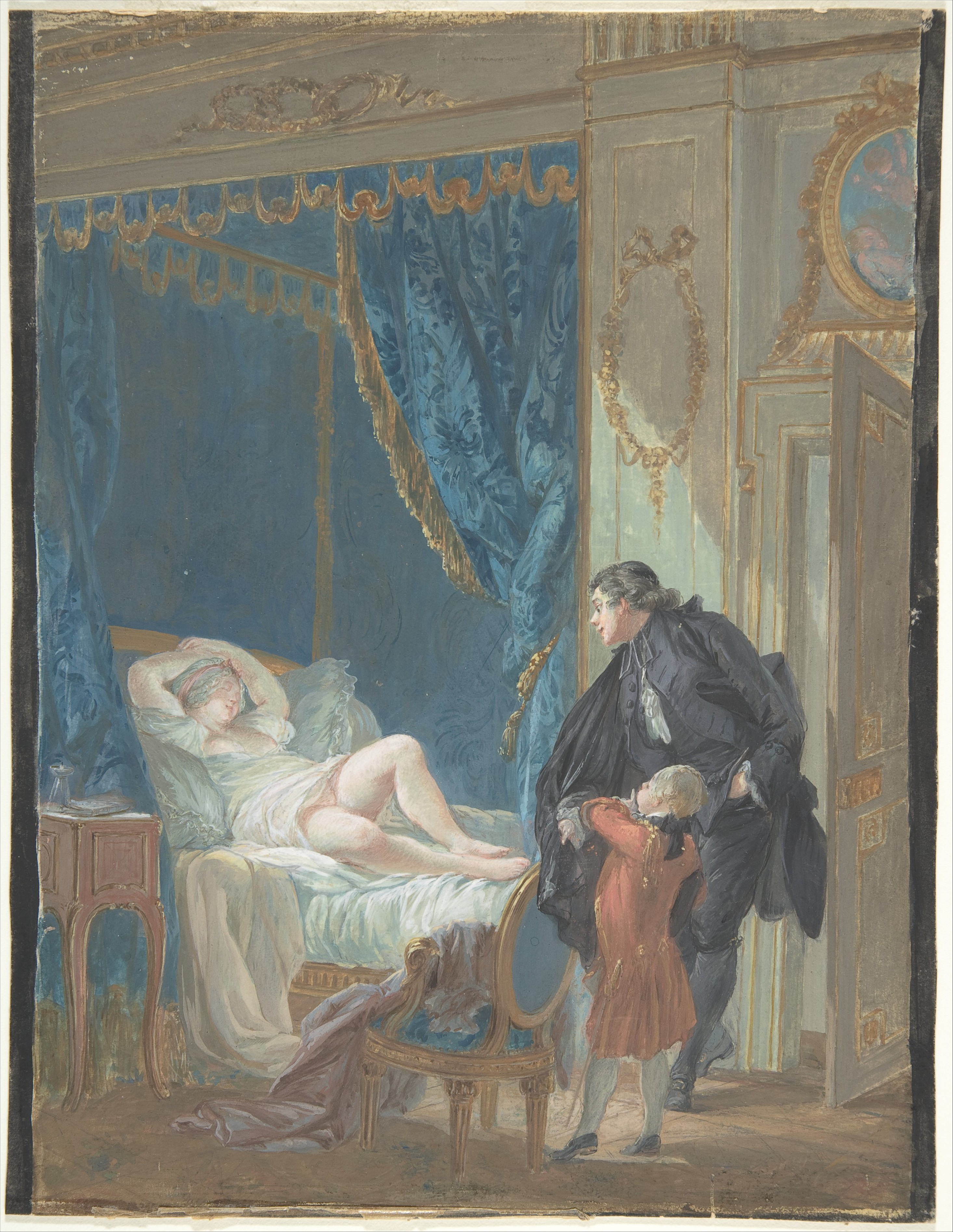 Drawing; Drawings